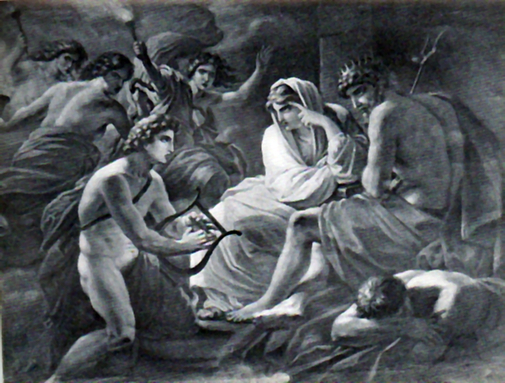 Orfeu în infern, ulei, Muzeul Brukenthal din Sibiu, 79,4 x 100 cm, nesemnat, nedatat foto alb/negru